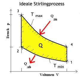 Skizze idealer Stirling Prozess